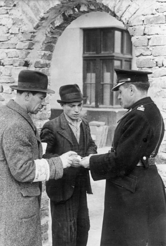 Polen, Ghetto Krakau, Ausweiskontrolle Gouvernement. Juden hinter Mauern. Die polnischen Polizeibeamten kontrollieren die Ausweise an den Eingängen zum Ghetto. PK-Koch-Scherl Bilderdienst 5211-41 Mai 1941